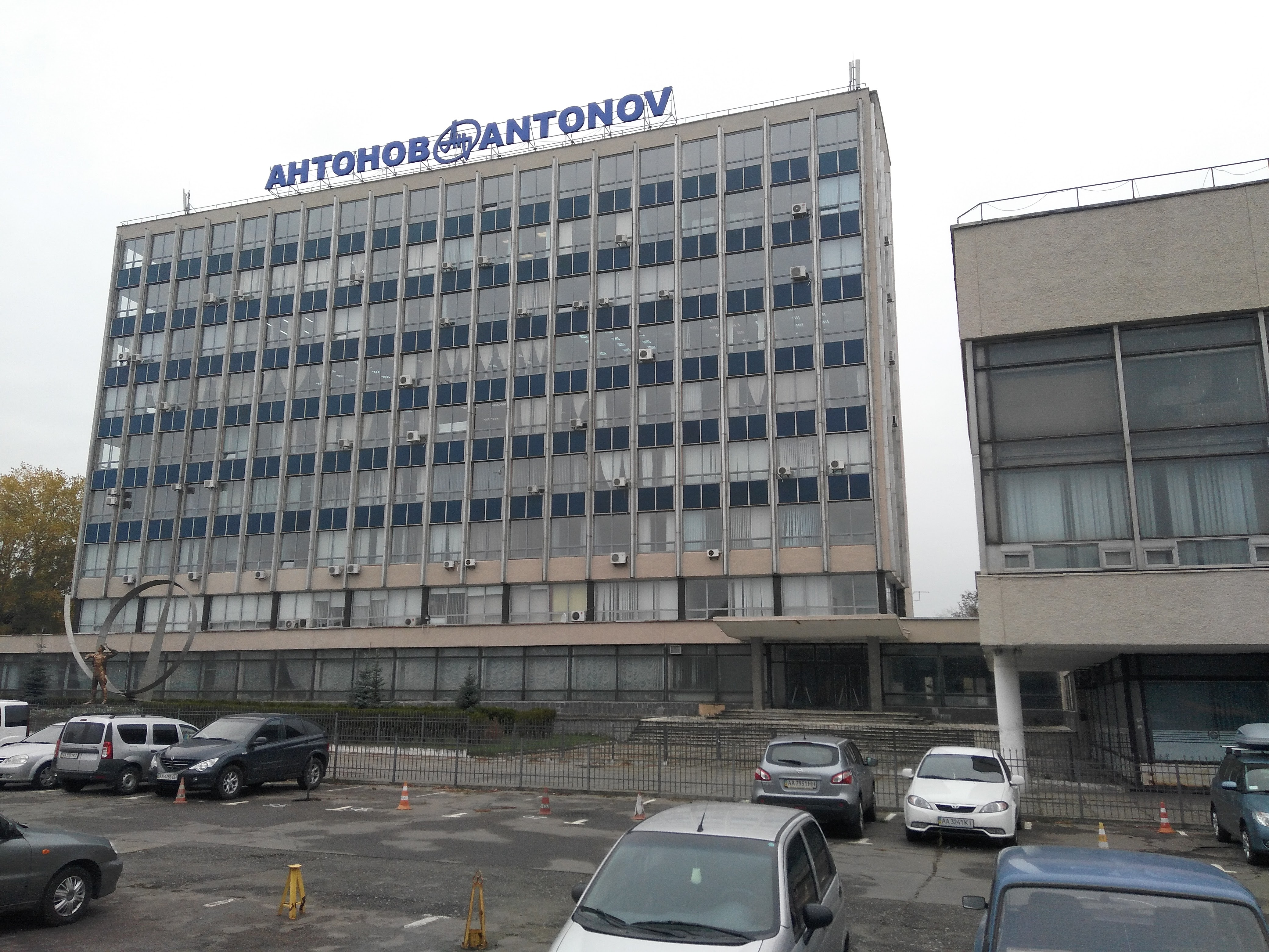 Фотографія корпусу заводу "Антонов" у Києві на проспекті Перемоги